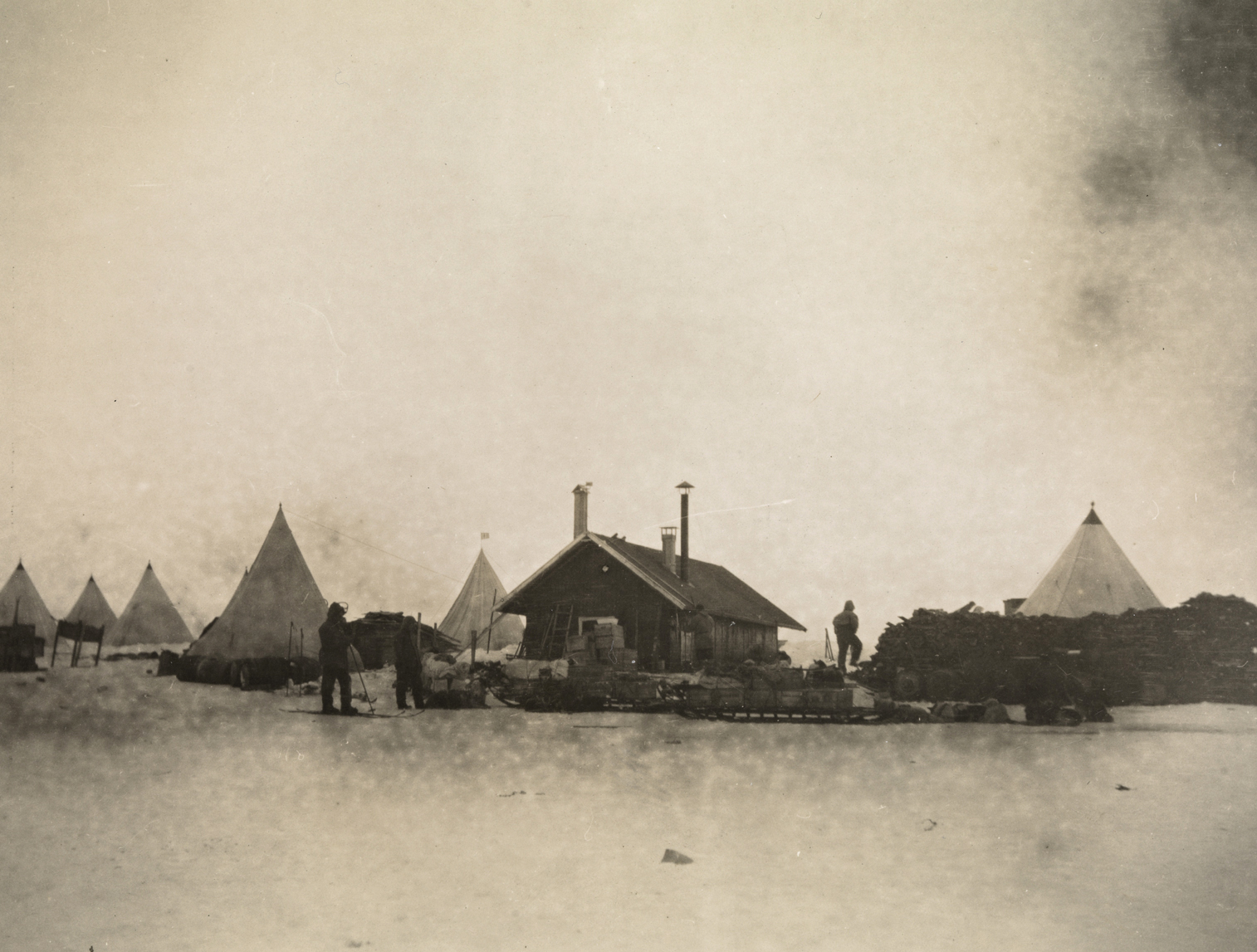 Tittel / Title: Framheim med telt, hundespann og utstyr rundt omkring Motiv / Motif: Papirpositiv. Tilsammen var det 14 telt rundt huset. Halvparten av dem var tilholdsted for hundene, mens resten ble brukt som lager for bl.a. hundefor og proviant. Dato / Date: 1911 Fotograf / Photographer: ukjent / unknown Sted / Place: Antarktis, Hvalbukta, Framheim Eier / Owner Institution: Nasjonalbiblioteket / National Library of Norway Lenke / Link: Bildesignatur / Image Number: bldsa_NPRA1117